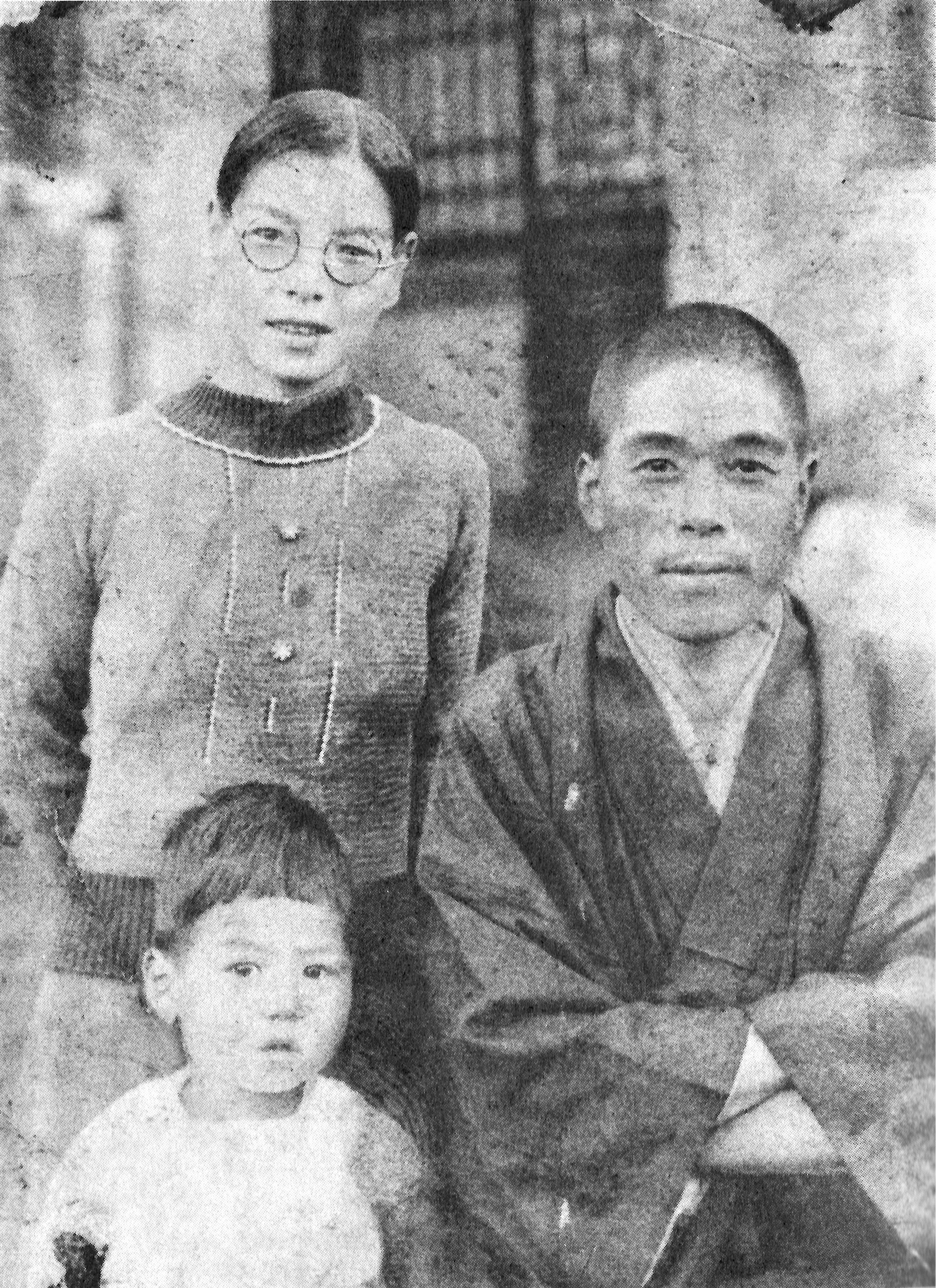 1940年頃、旧満州にて写す。左から赤塚リヨ、赤塚不二夫、赤塚藤七。